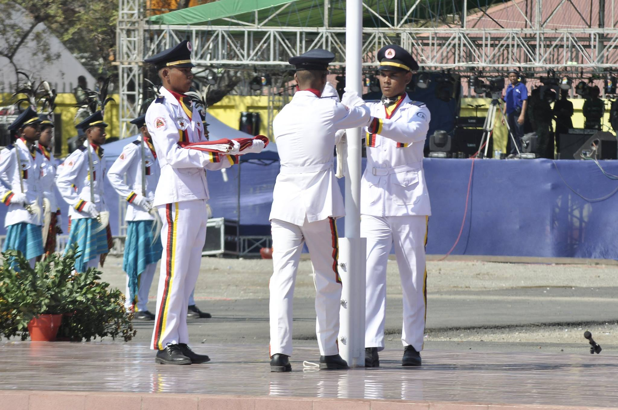 Tetun: Serimónia Komemorasaun Loron Proklamasaun Indpendénte